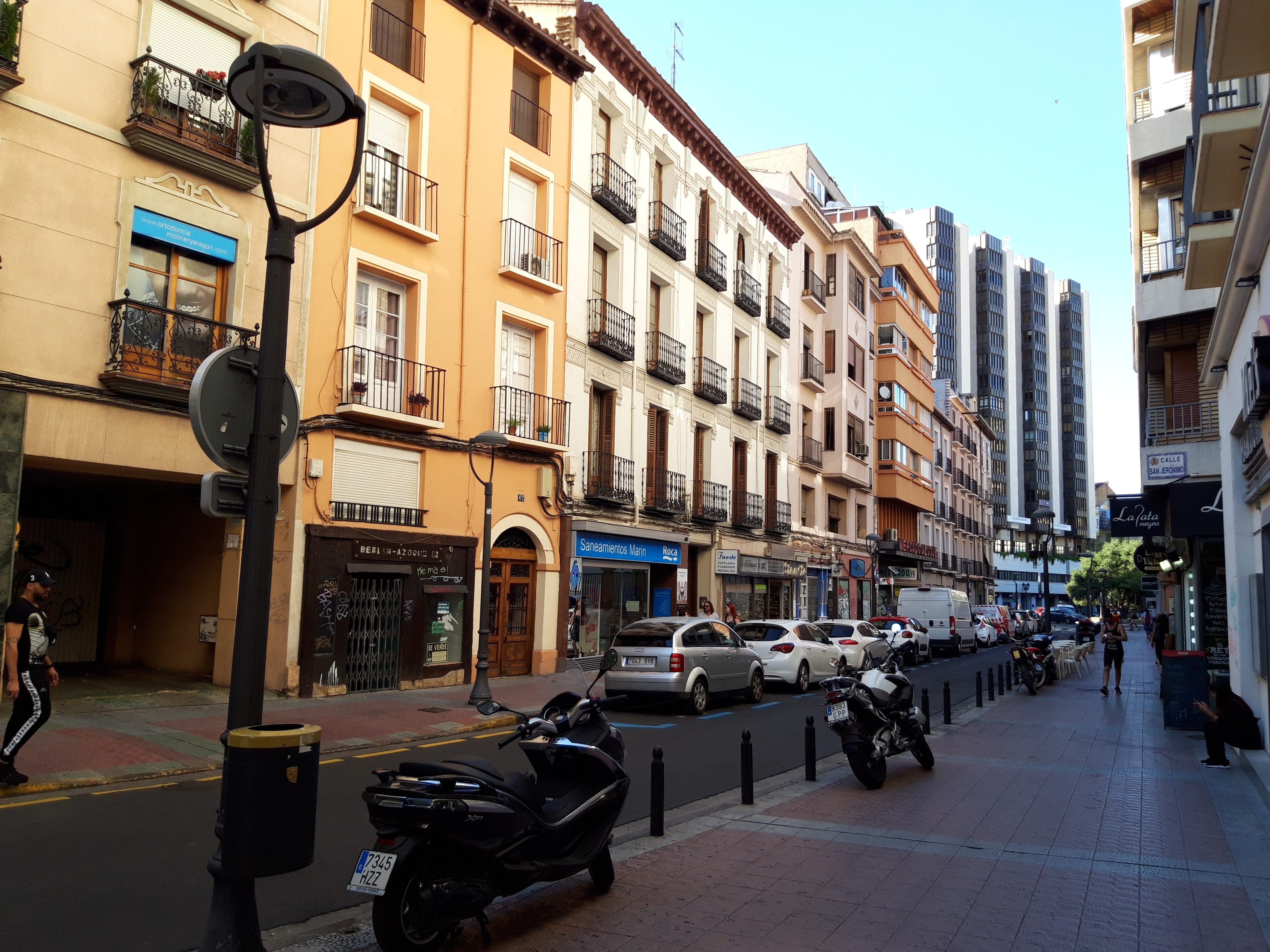 Aragonés: Carrera Azoque, Zaragoza